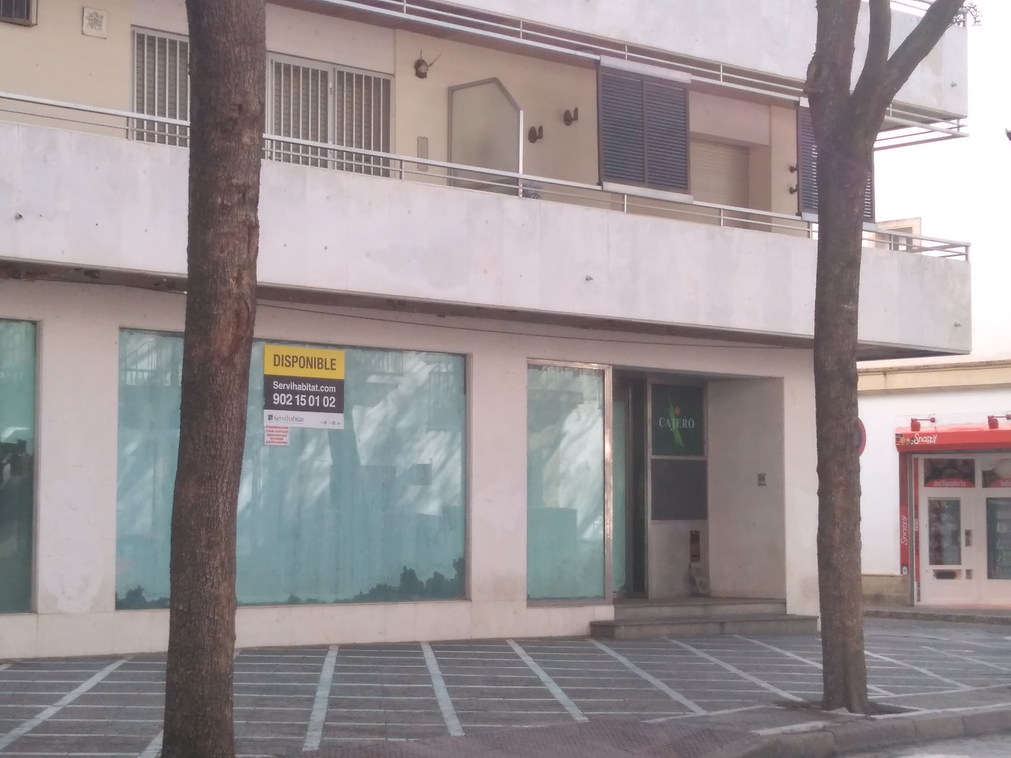 Cajero de Cajasol cerrado en Jerez de la Frontera.